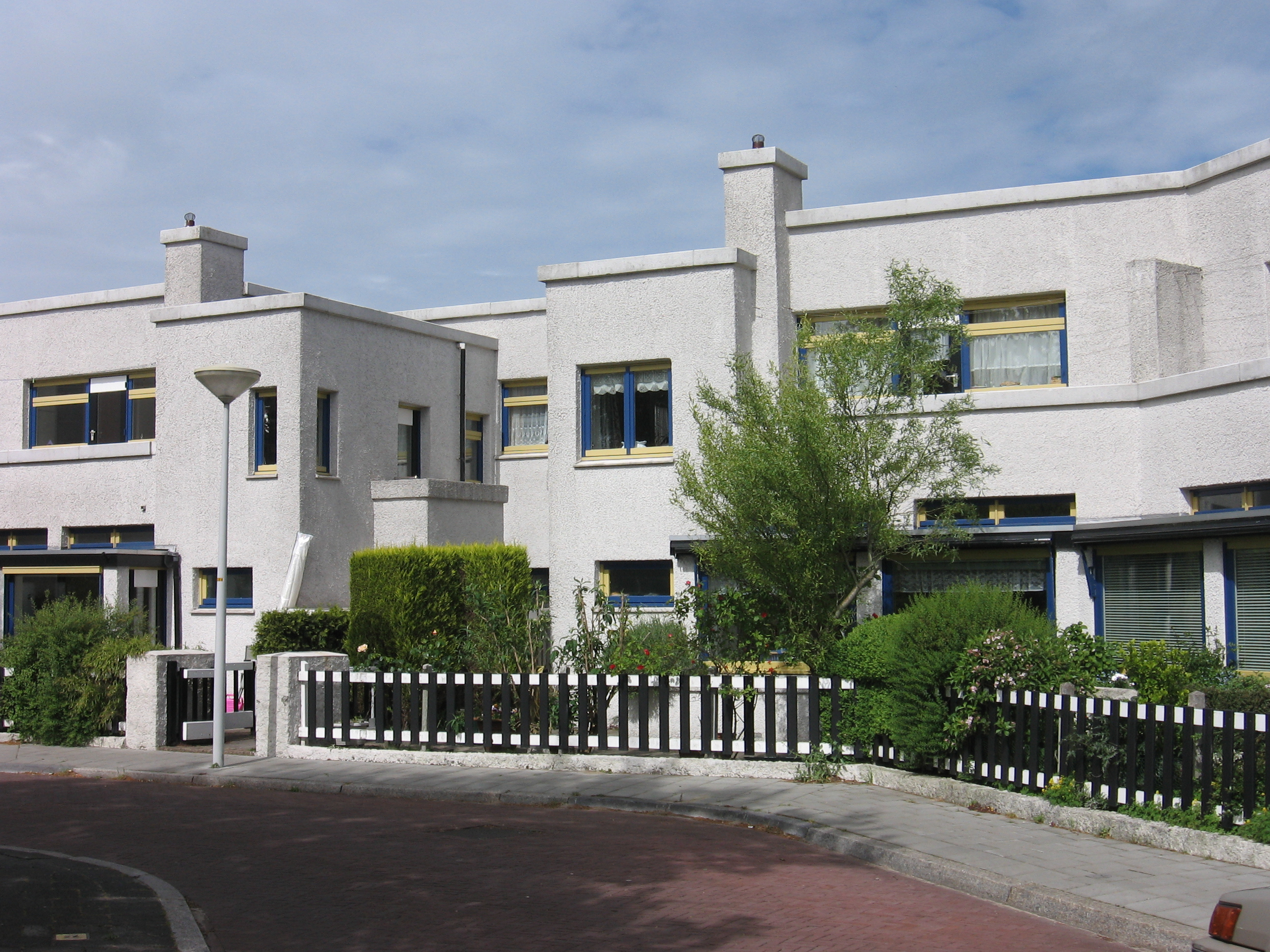 Papaverhof, Den Haag, mei 2007